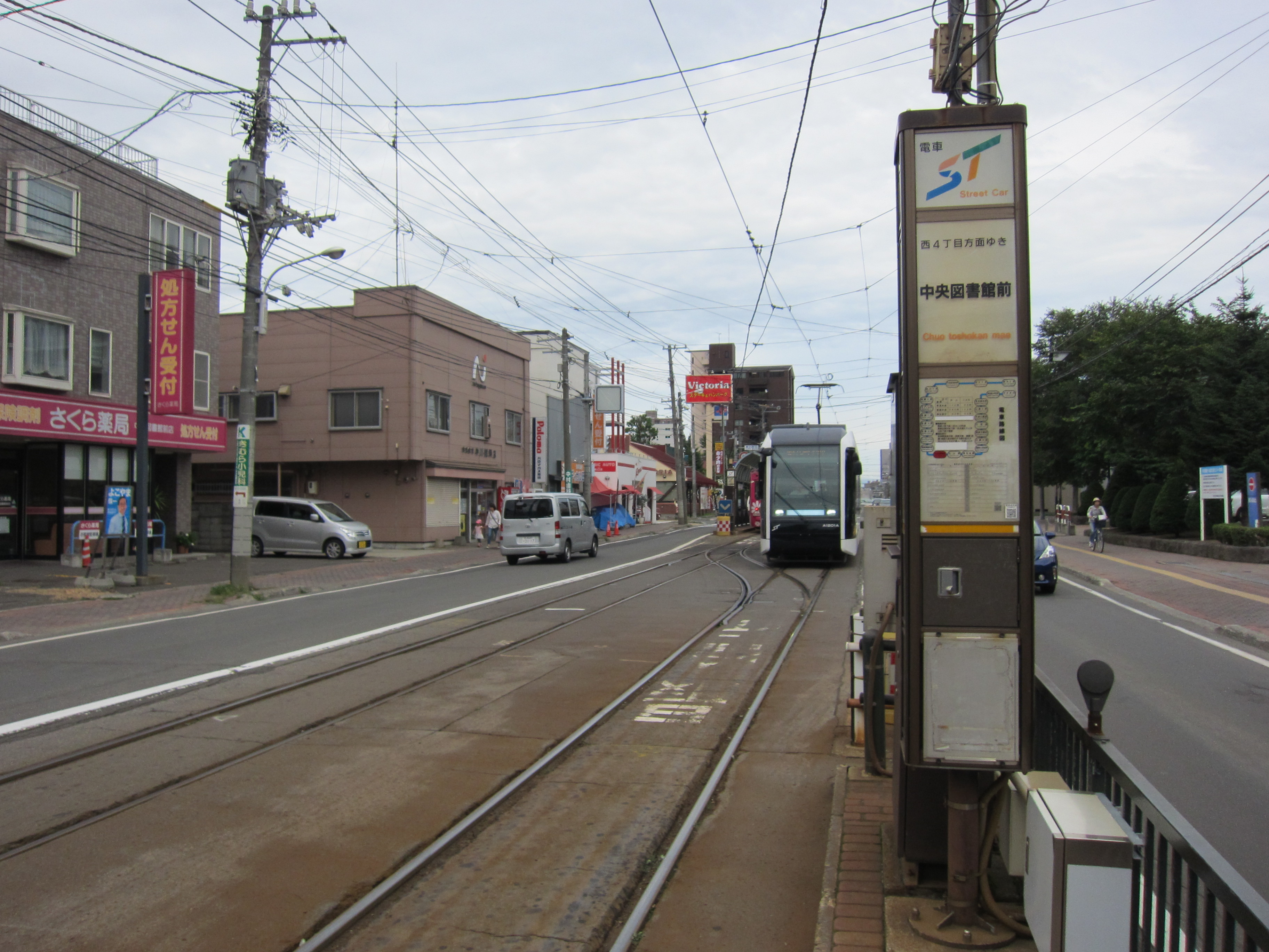 札幌市電の中央図書館前停留場と接近するA1200形電車